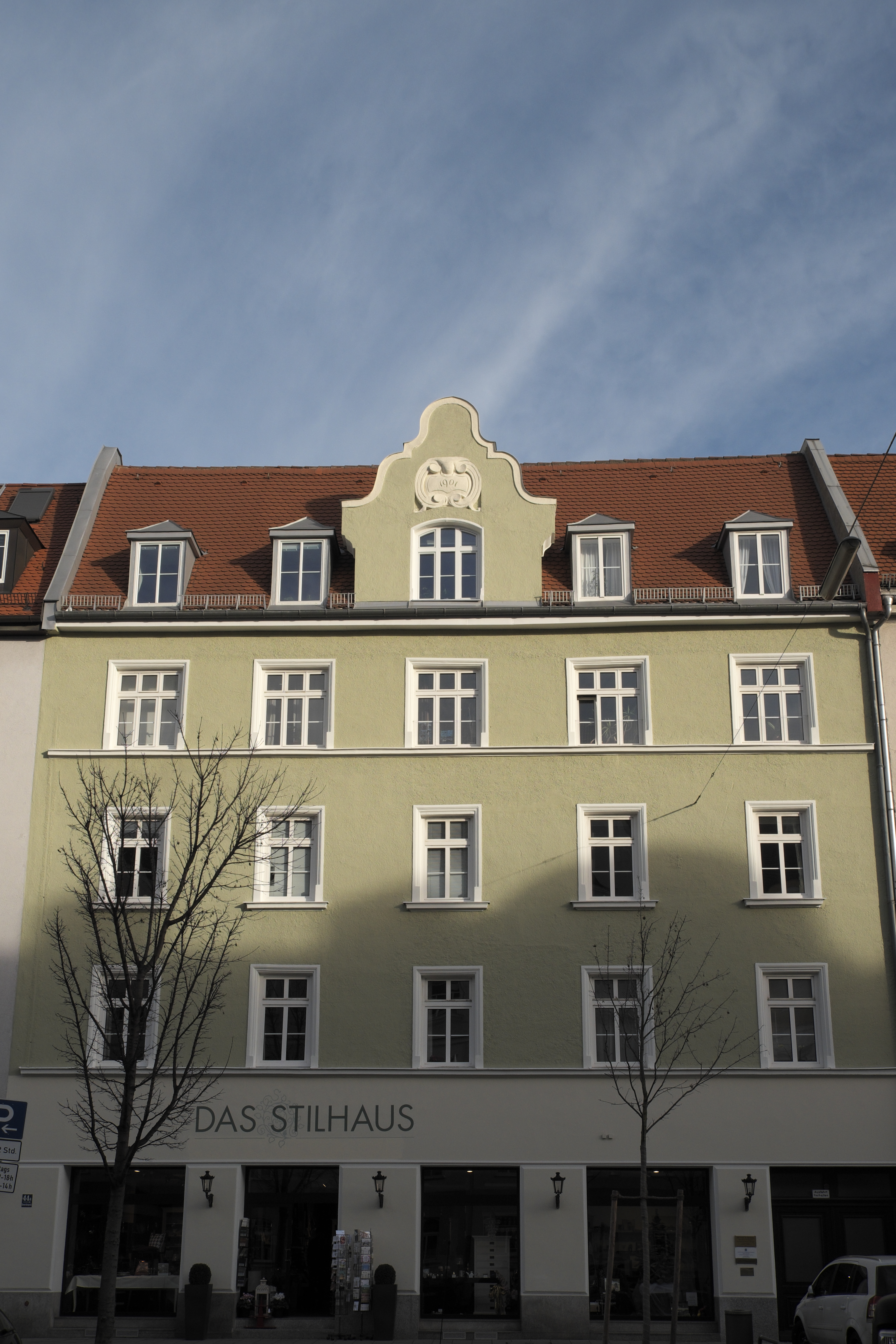 Mietshaus in der Donnersbergerstraße 44a in Neuhausen im Stadtbezirk Neuhausen-Nymphenburg in München (Bayern/Deutschland), mit der Jahreszahl 1901, von Eduard Müller